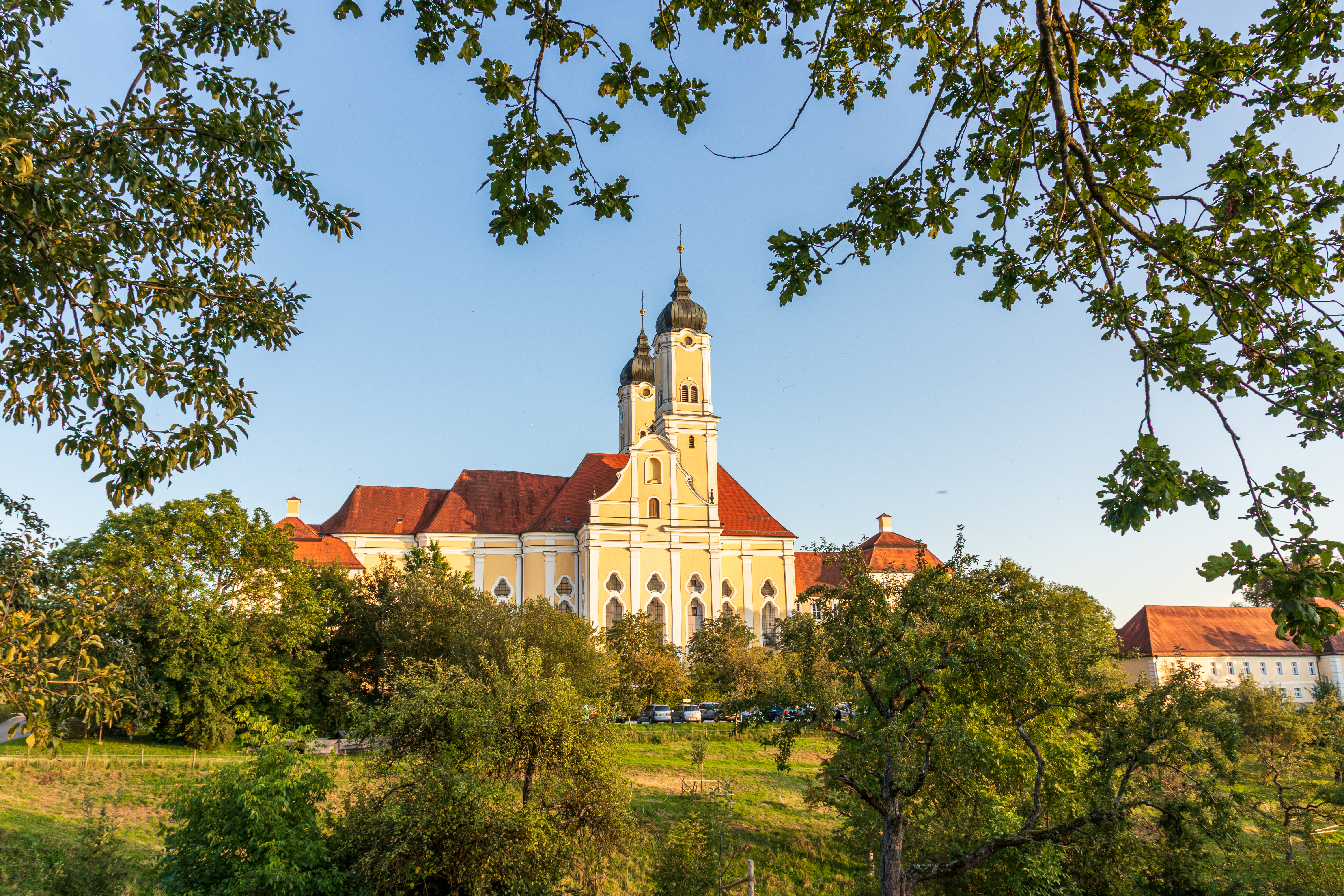 Kloster Roggenburg im Abendlicht